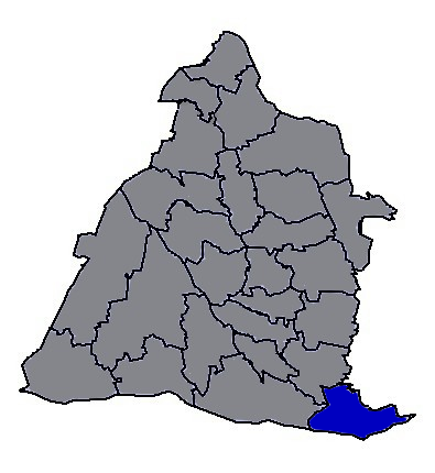 臺灣省彰化縣二水鄉。